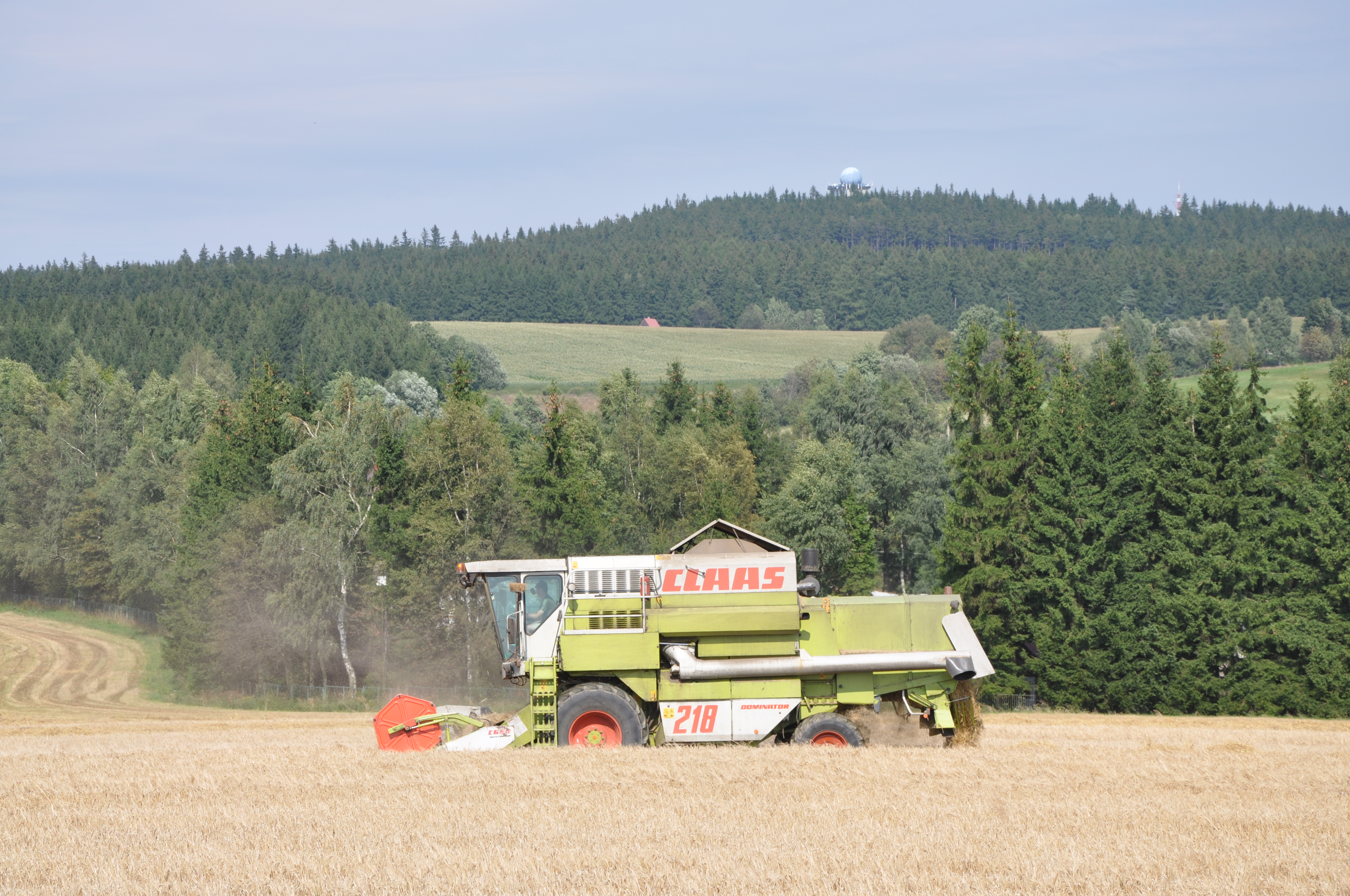 Claas Dominator 218